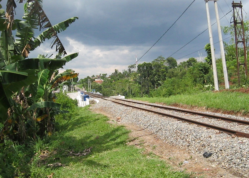 Ciranjang, Cianjur